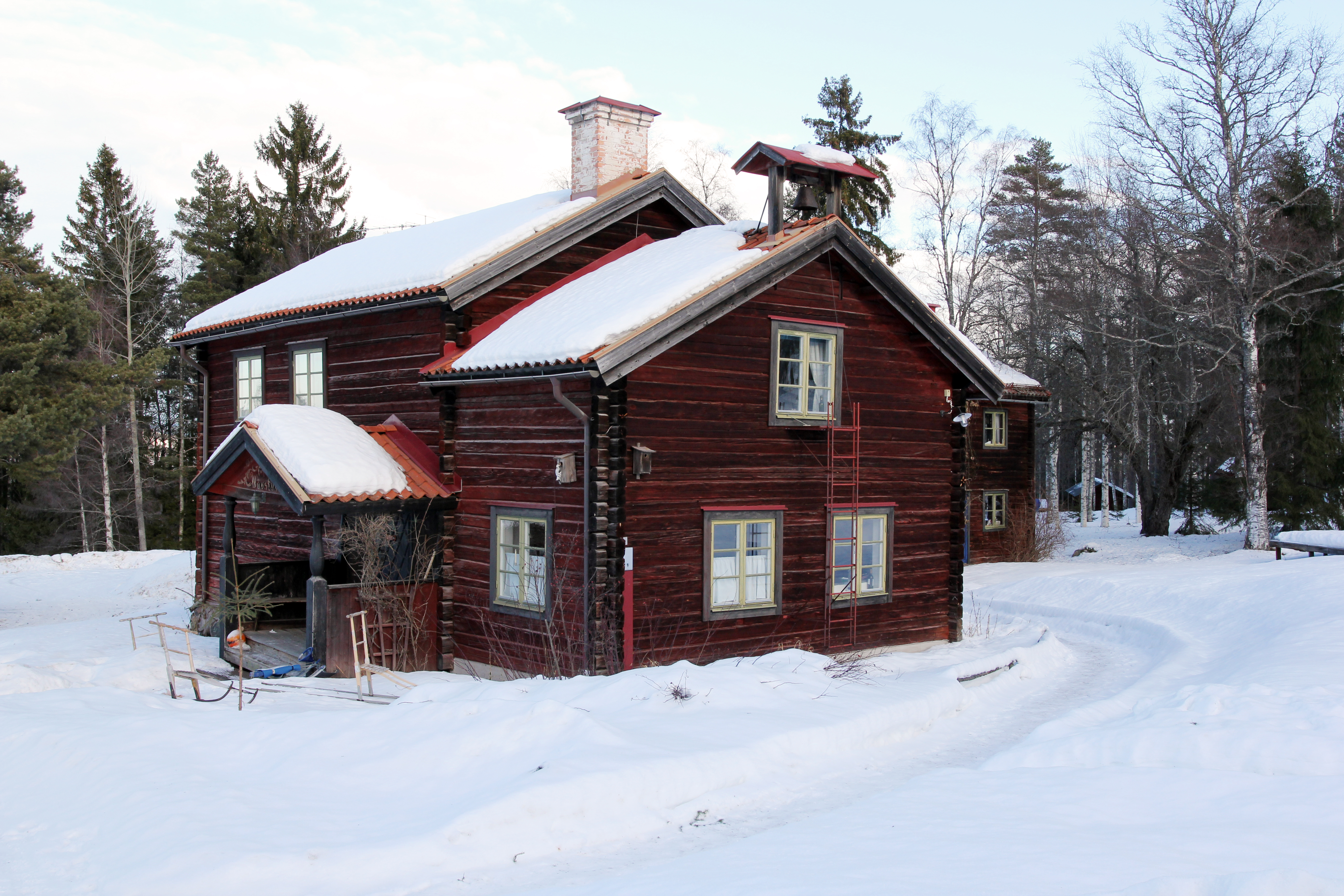 Vävstugan i Sätergläntan, Leksands kommun, Sverige.